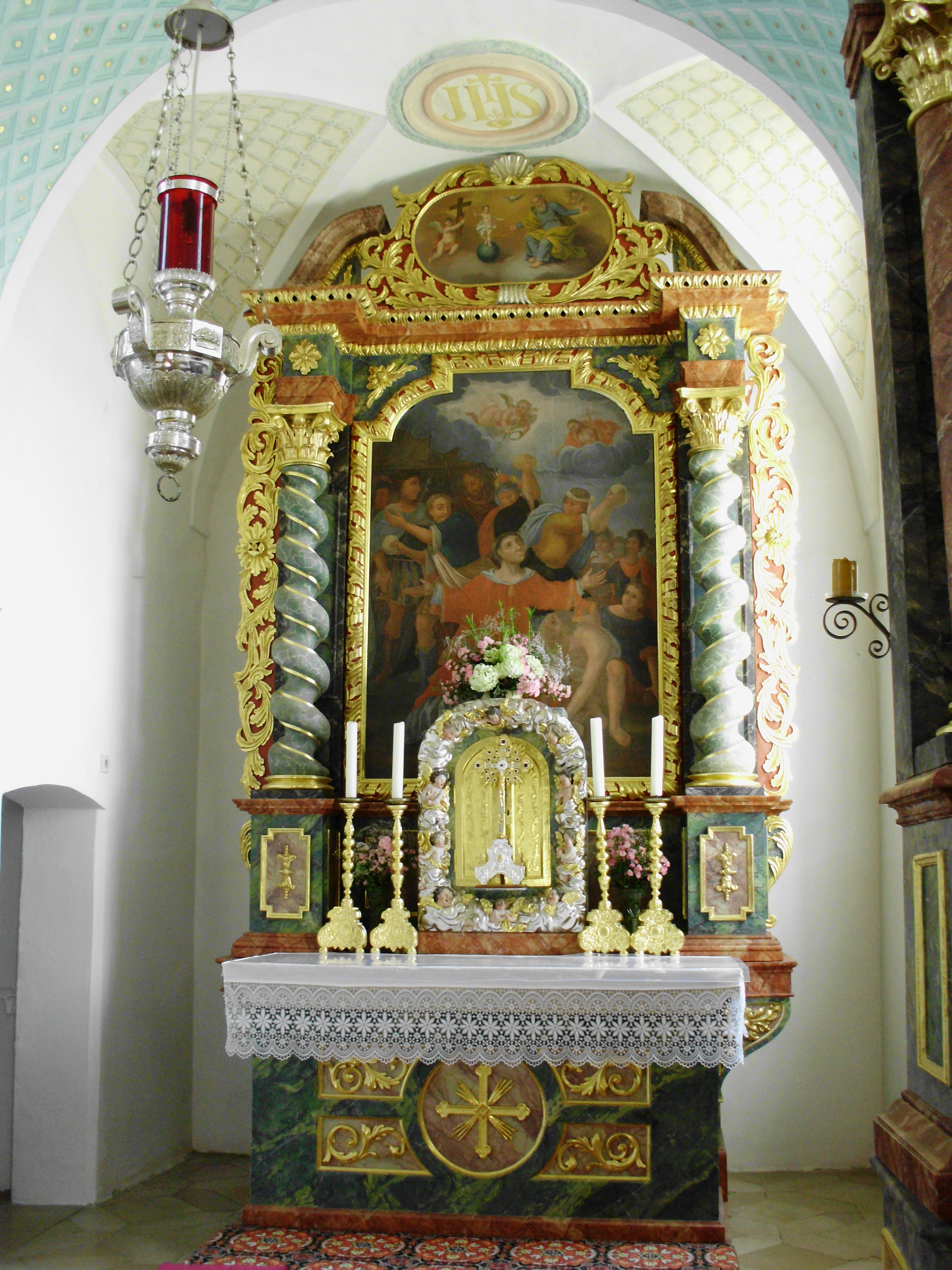 Unterdolling, Filialkirche St. Stephan, Hauptaltar